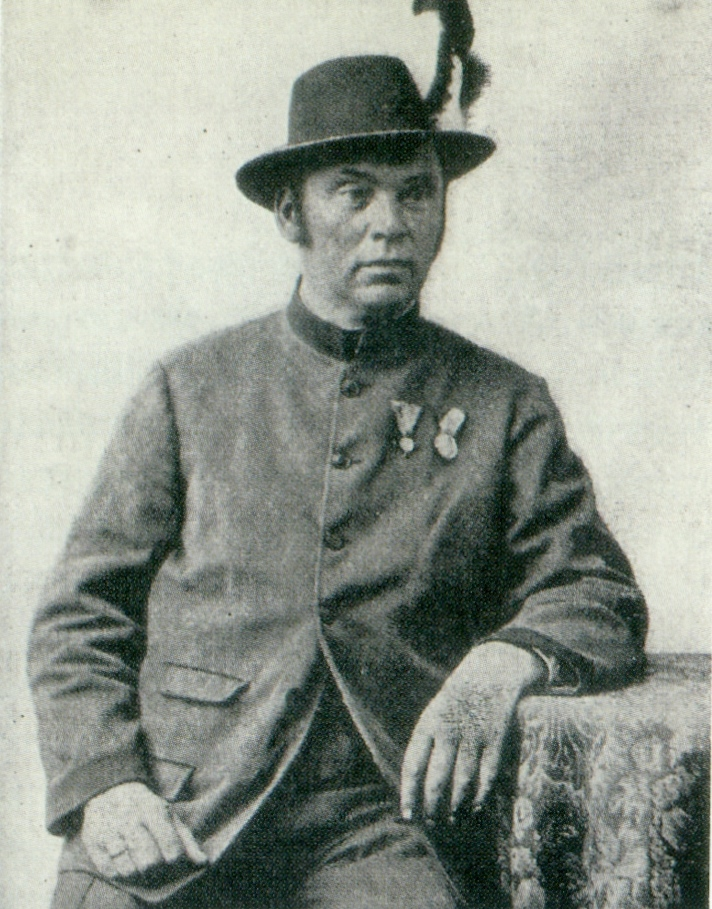 Ludwig von Comini (1814-1869), der "Schwefelapostel". Fotografie um 1860.